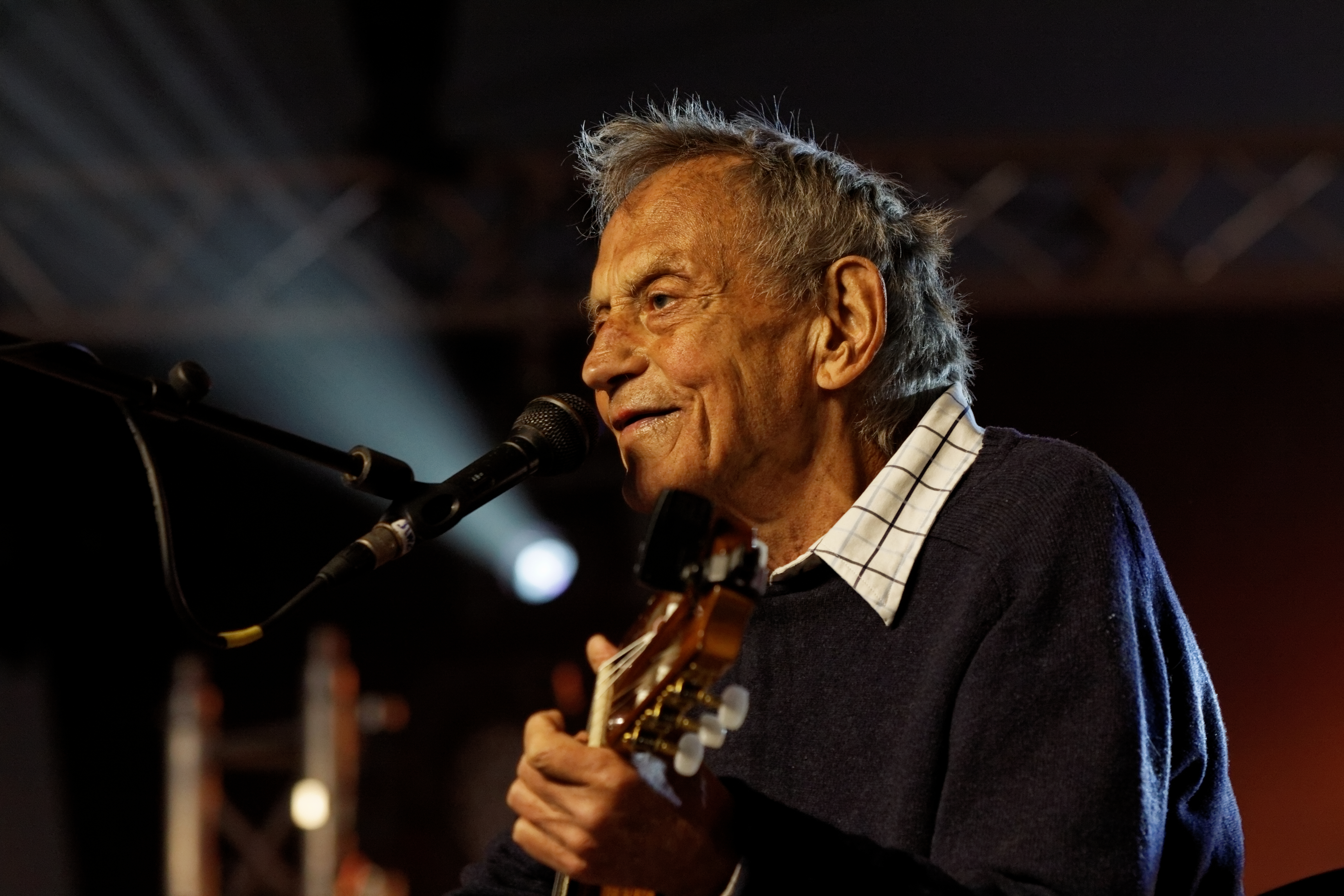 Graeme Allwright en concert à l'espace évêché lors du festival de Cornouaille 2012.